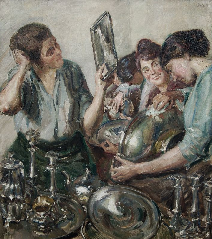 Mädchen beim Silberputzen. 1919. Öl auf Leinwand. 95 x 85 cm